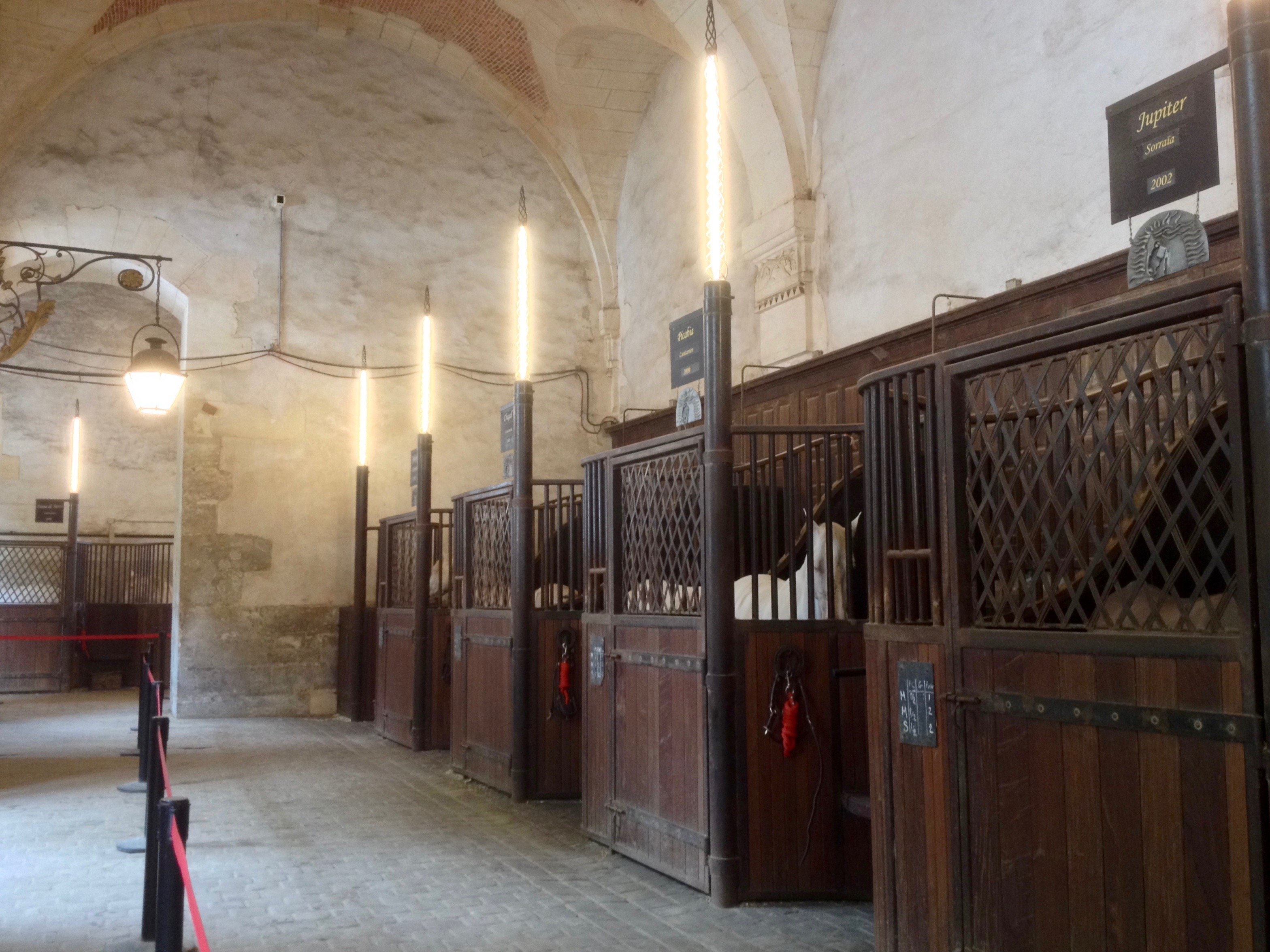 l'écurie pour l'académie équestre nationale du Domaine de Versailles